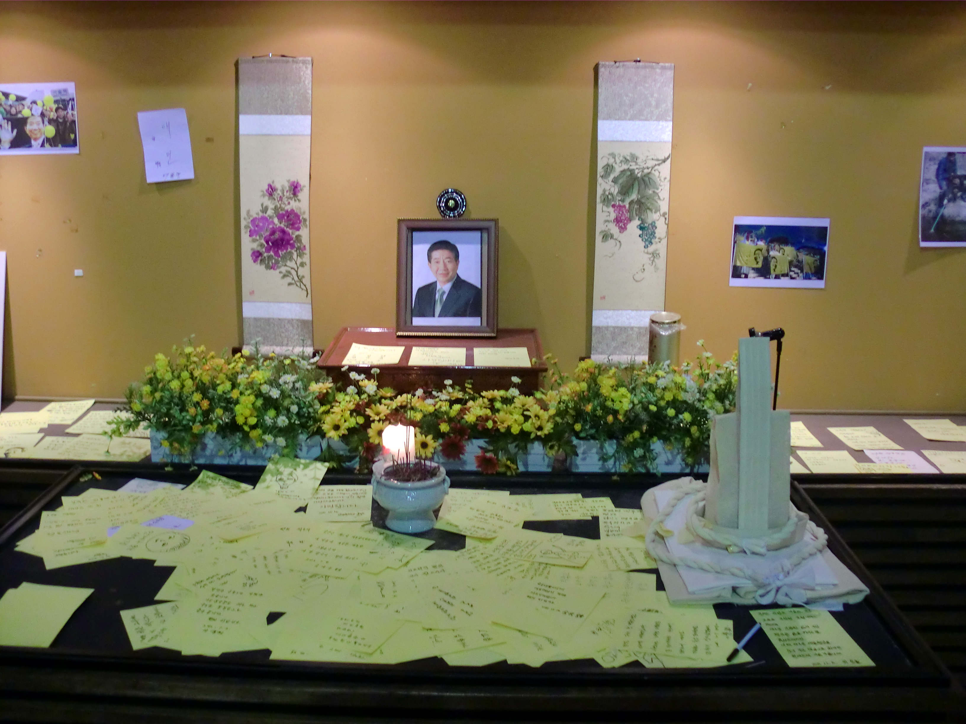 노무현대통령 생가 쉼터 내부